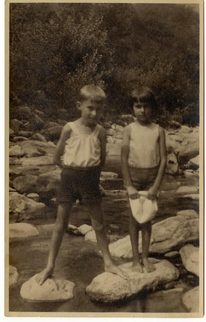 Ritratto infantile - due bambini (fratello e sorella) a piedi nudi sui massi di un torrente - sullo sfondo vegetazione e torrente 1927 - 1928, Torre Pellice (TO) Formato: 10x15